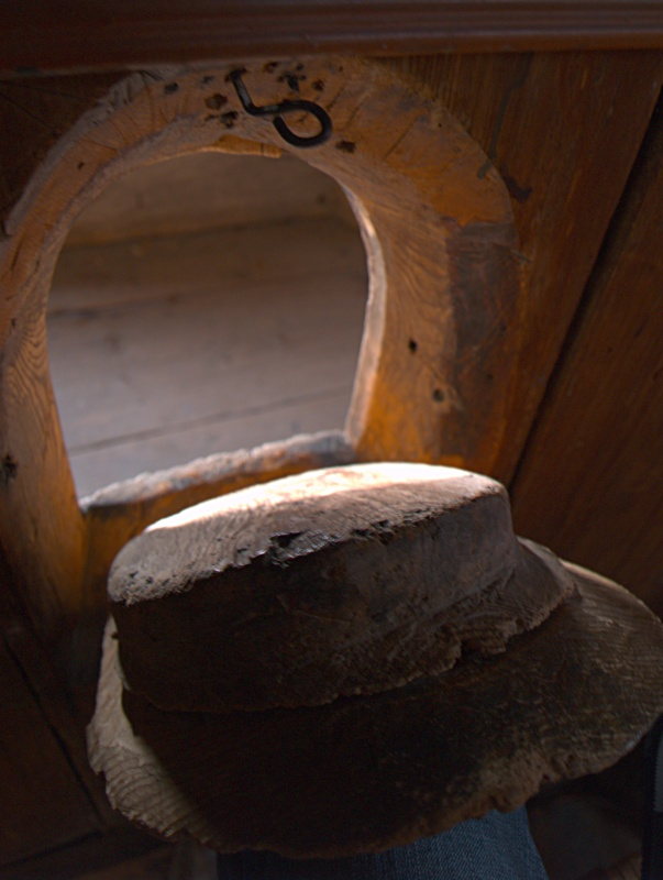 Luke på sørveggen i Reinli stavkirke